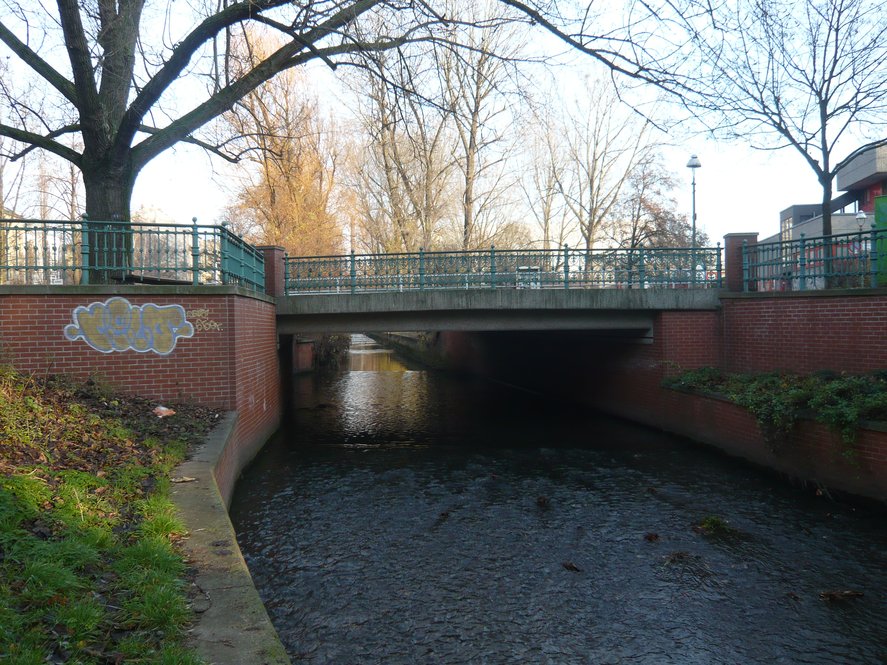 Pankebrücke in Berlin